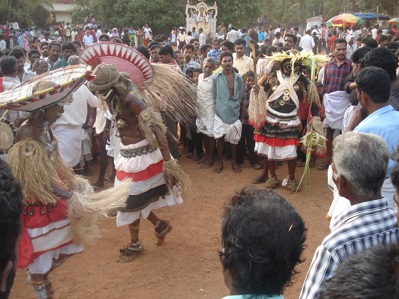 “Parappoothan”, Chirankara Pooram, Pallippuram